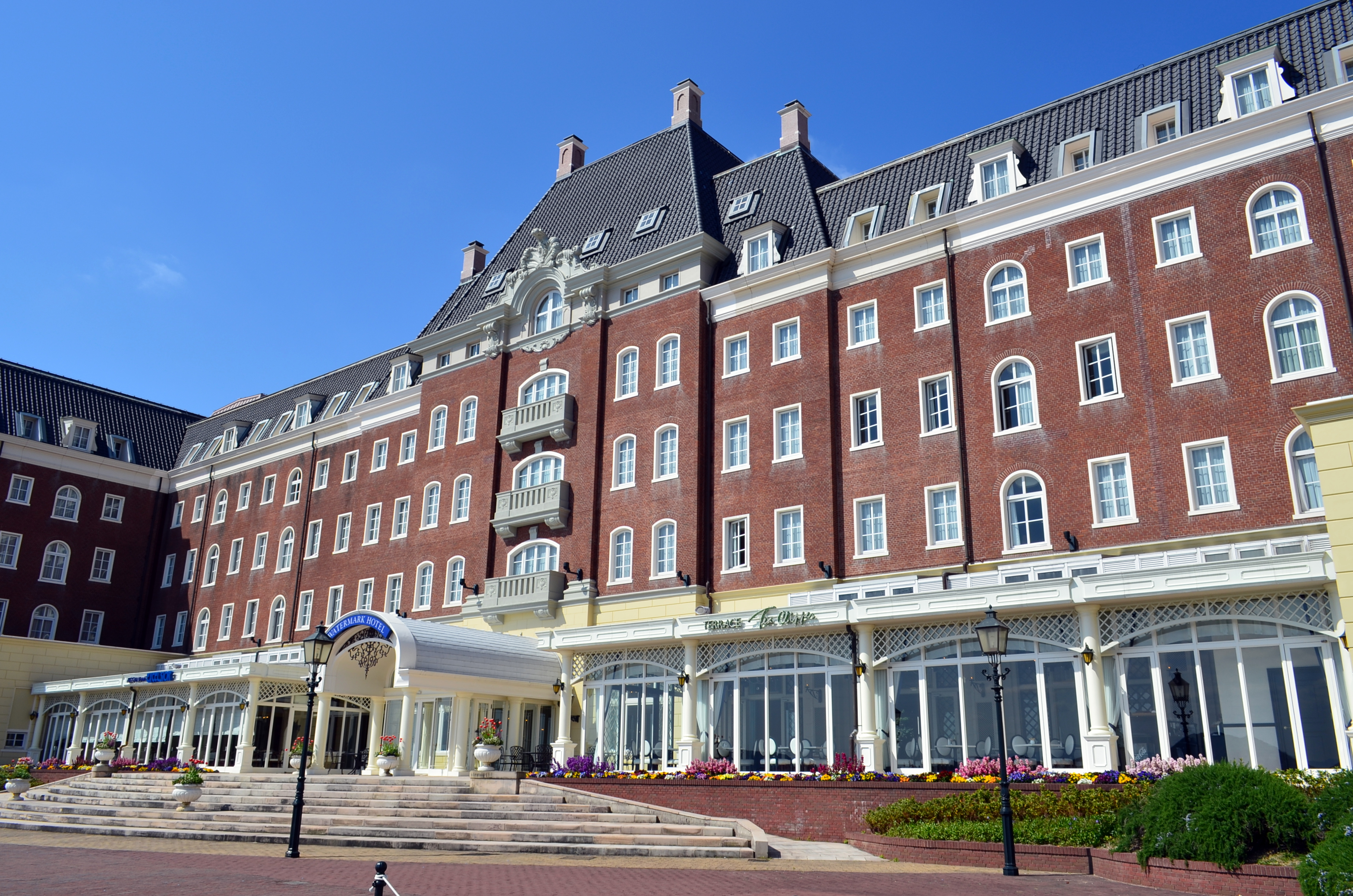 Watermark Hotel Nagasaki Huis Ten Bosch